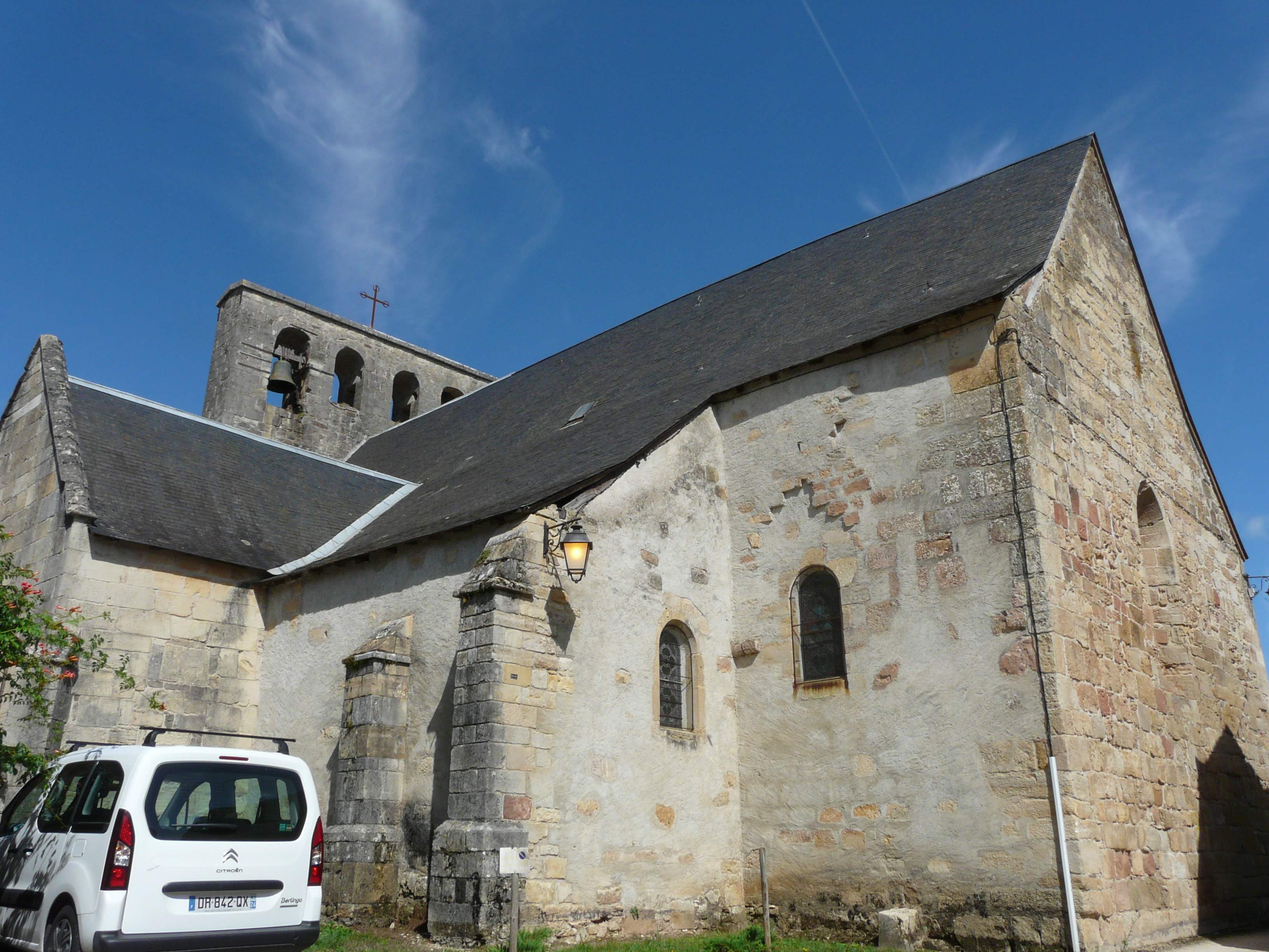 L'église de l'Invention-de-Saint-Étienne, Nailhac, Dordogne, France.